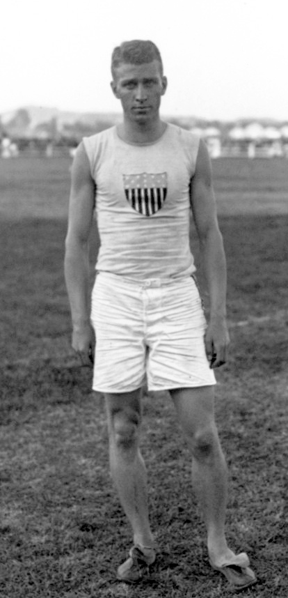 [Ed] Cook (Américain) gagnant du saut à la perche [2 août 1908, meeting international d'athlétisme, à Colombes] : [photographie de presse] / [Agence Rol]